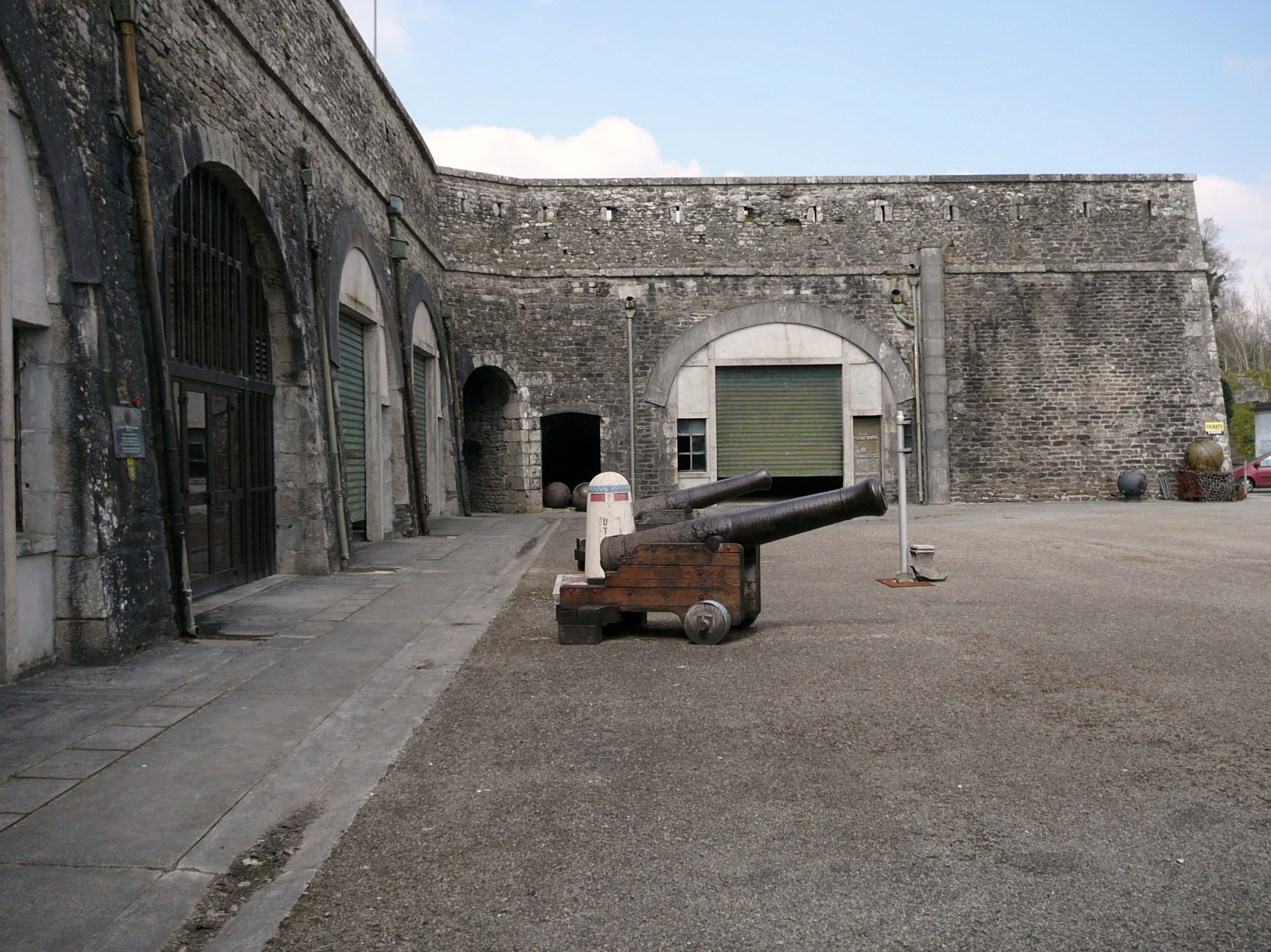 Fort Montbarey Brest